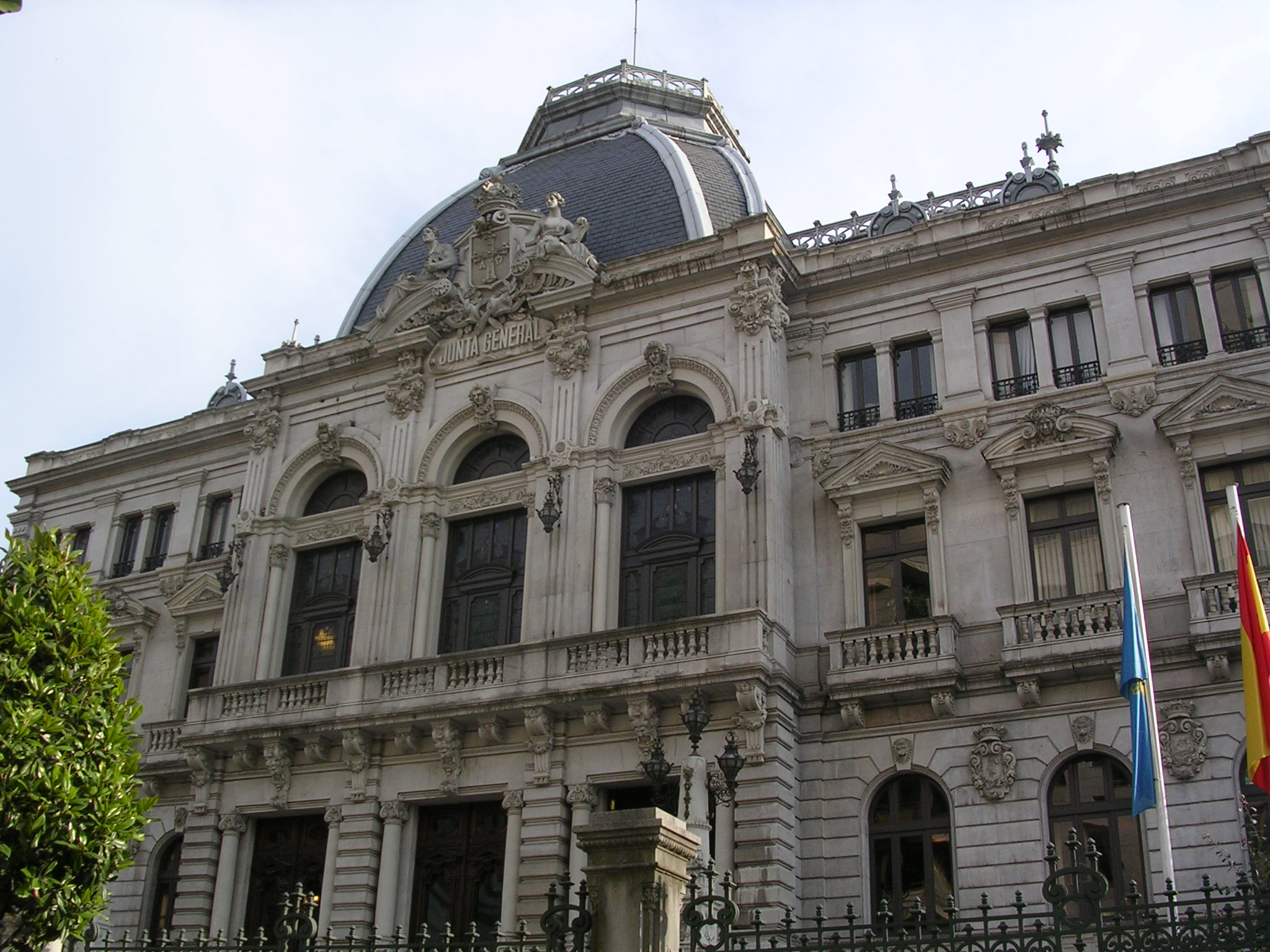 Edificio de la Junta General del Principado de Asturias en Oviedo.